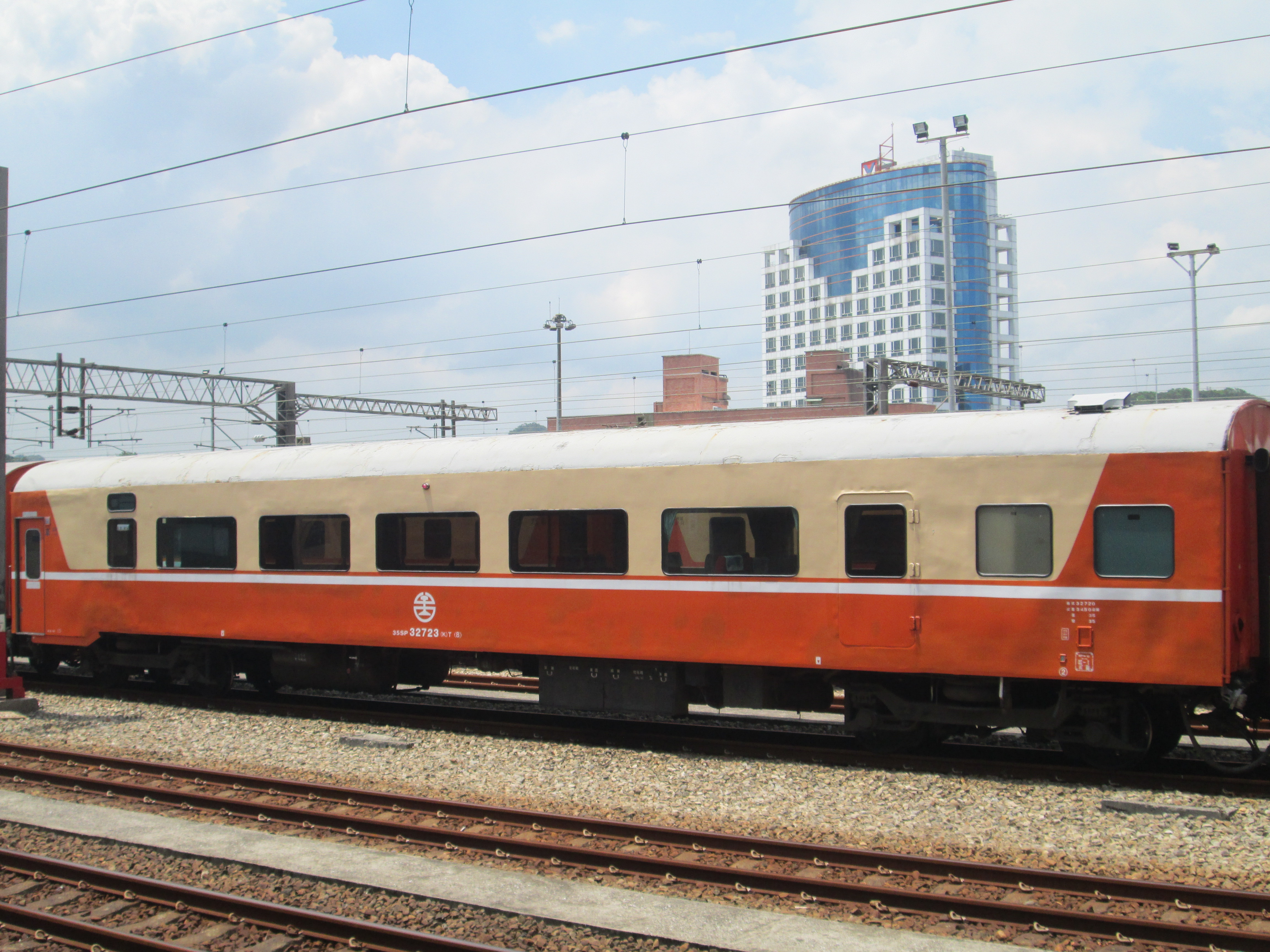 臺灣鐵路管理局莒光號客車35SP32723(K)T(B)停靠七堵調車場。